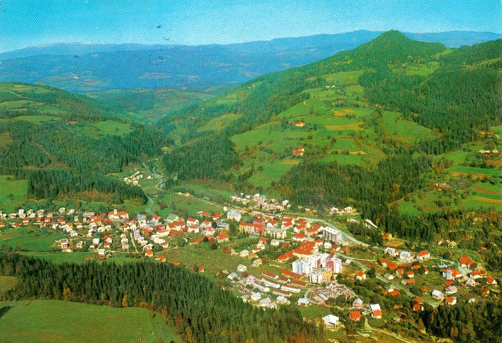 Razglednica Mežice.